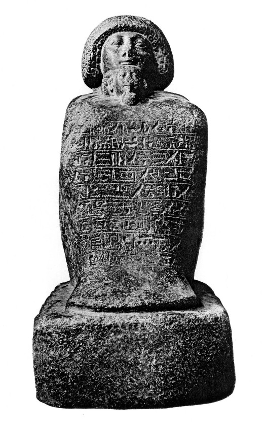 Erzieherstatue Ägyptisches Museum Kairo, CG 42171 18. Dynastie, Zeit des Thutmosis III. Benermerut mit dem ihm anvertrauten Königskind Merit-Amun, eine Tochter des Thutmosis III.